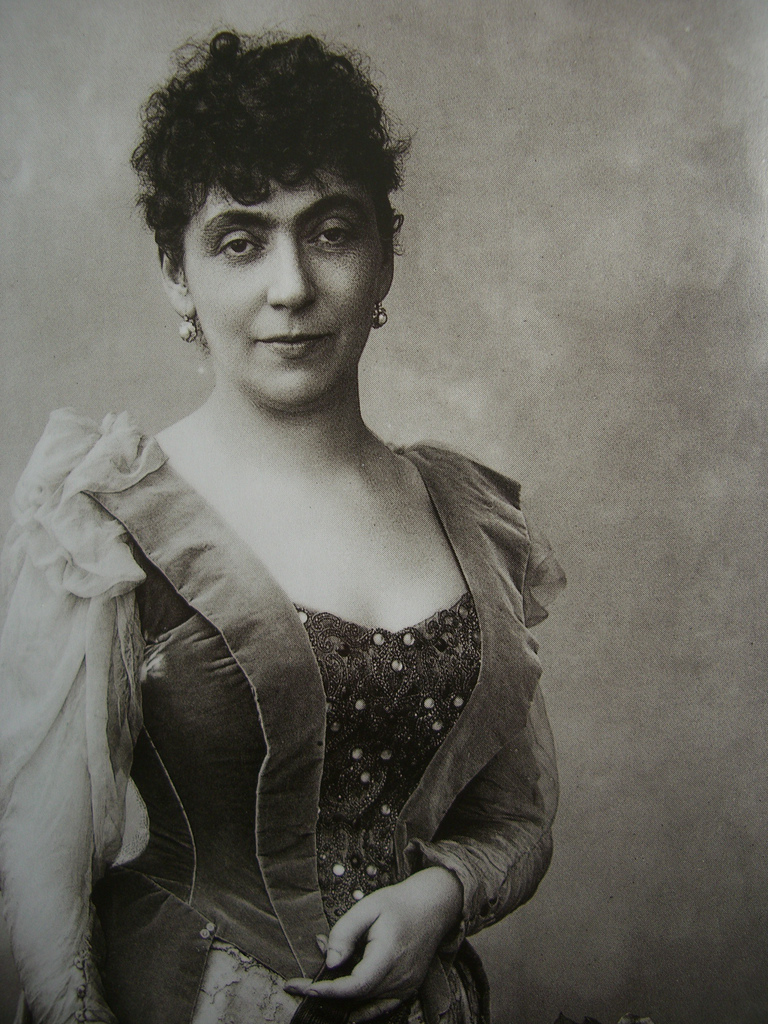 Portrait de Madeleine Lemaire by Paul Nadar (see [1]).